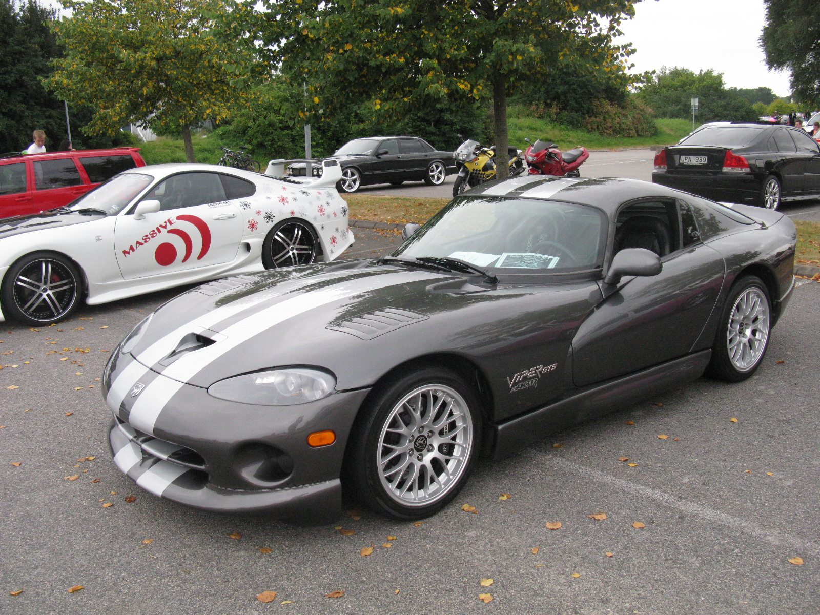 Dodge Viper GTS